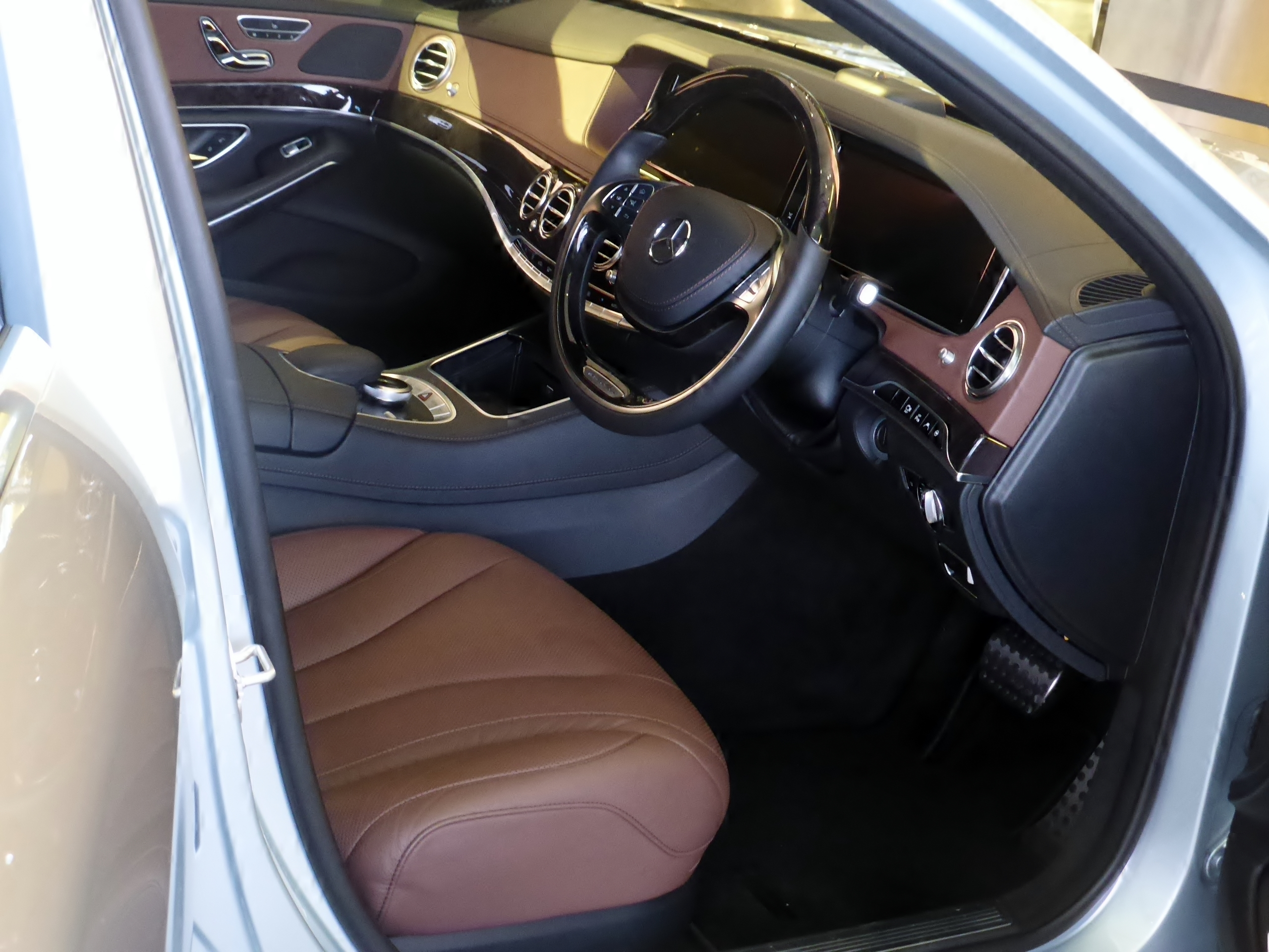 W222型メルセデス・ベンツS400ハイブリッドのインテリアを撮影。